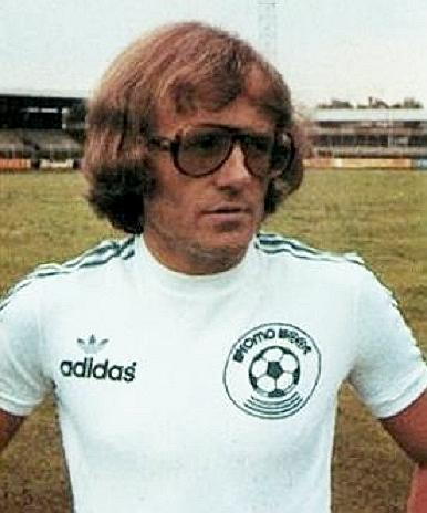 Gilbert Gress en 1979, 'Panini Football 79 (Americana)', Panini figurina n°309.